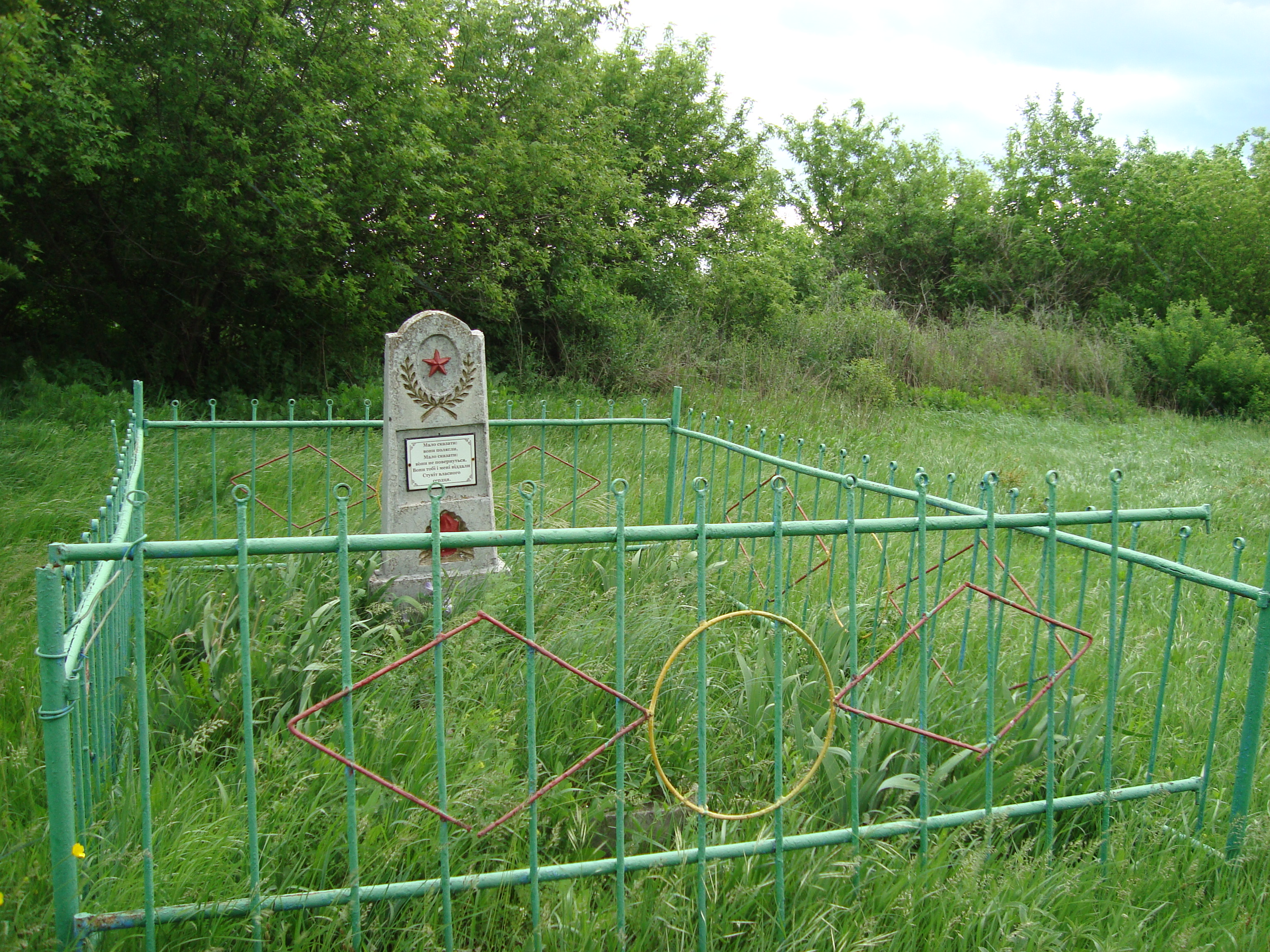 Пам'ятник невідомому солдату в с.Чернявщина